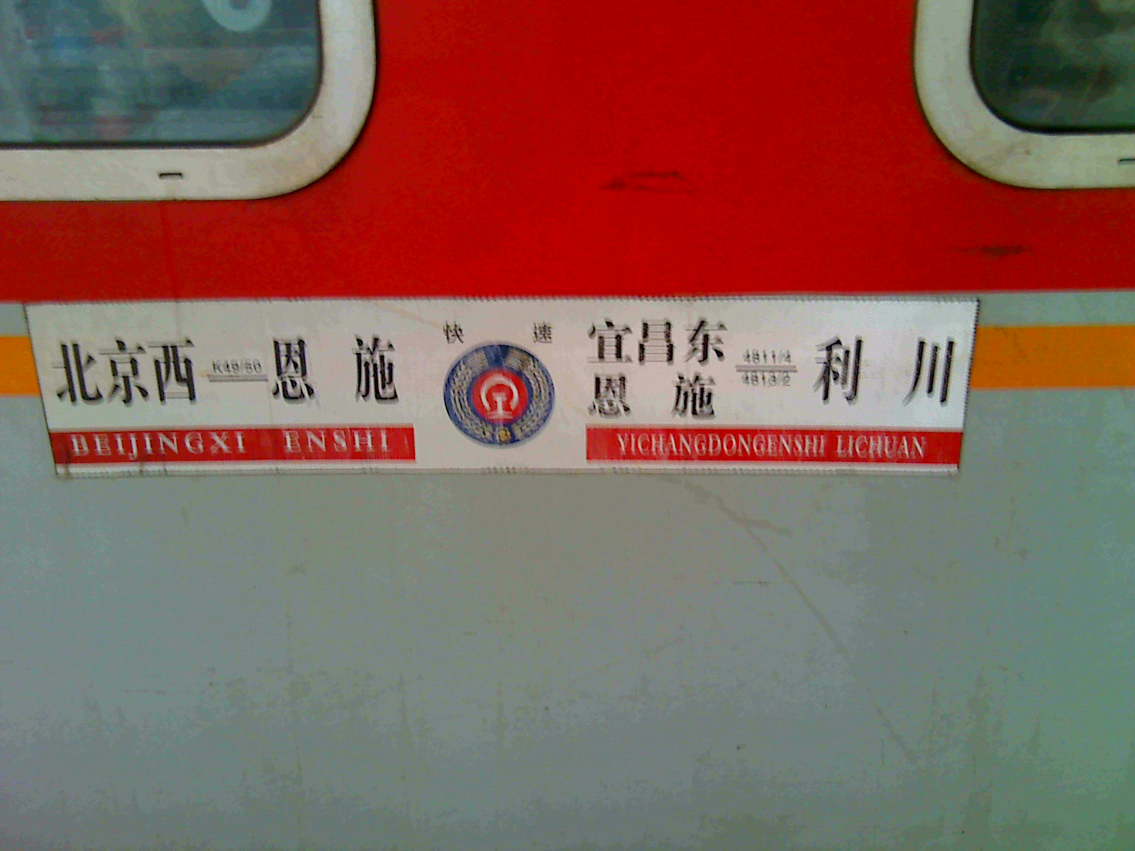 K49-50次列车和4811-2-3-4次列车的方向牌，摄于2013.2.3